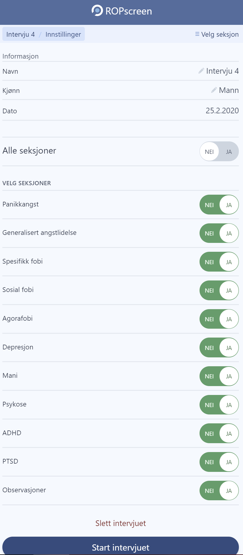 Screenshot med oversikt over de ulike delene i intervjuet